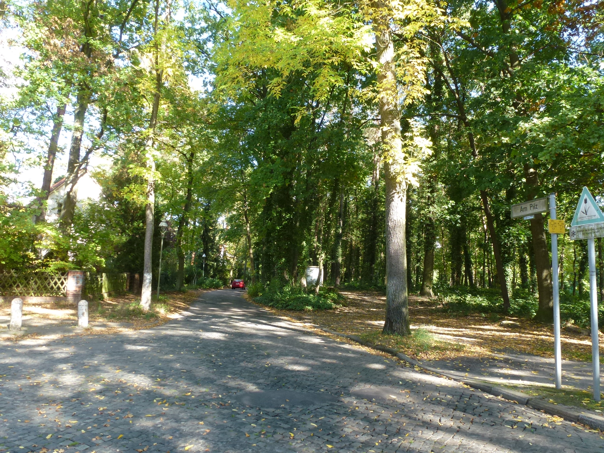 Berlin-Frohnau Am Pilz